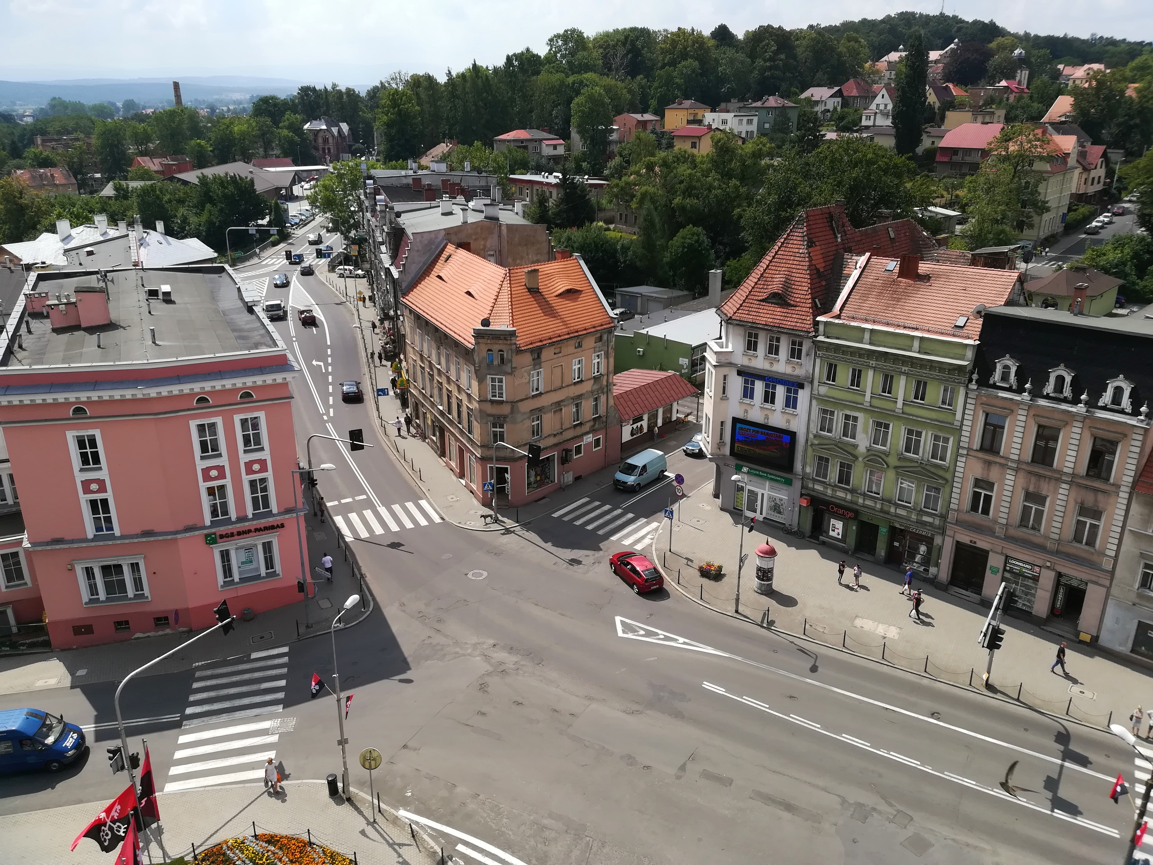 Widok z Wieży Brackiej w Lubaniu Śl.